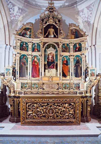 Miglionico - Il Polittico di Cima da Conegliano custodito all'interno della Chiesa Madre